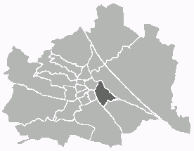 Positionskarte des 3. Wiener Gemeindebezirks Unter Verwendung einer Vorlage von Extrawurst. Public Domain.